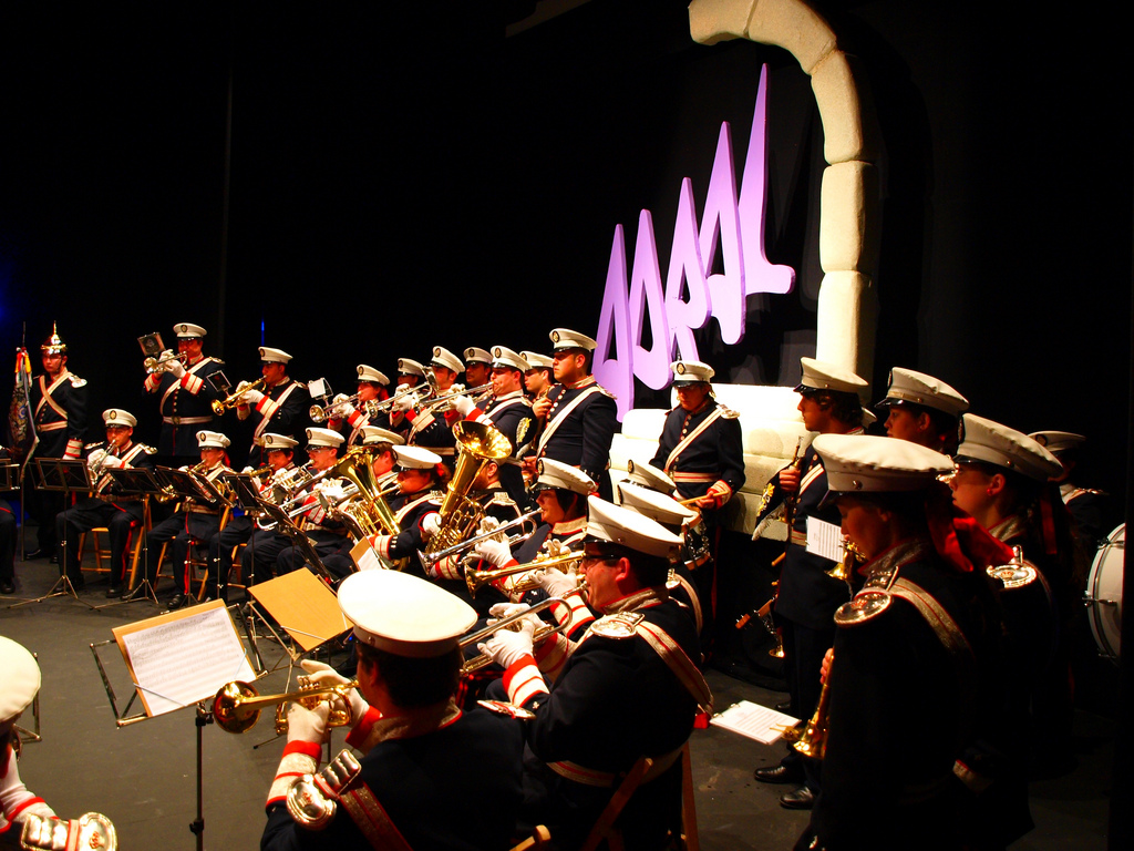 I Certamen de Bandas de Semana Santa "Cidade de Viveiro" celebrado el 27/03/2011 en el Teatro Pastor Díaz. Fotografía publicada bajo licencia Creative Commons (CC-BY-SA) - Enrique Pernas. Foto tomada con Olympus E-450+ Zuiko 14-42.